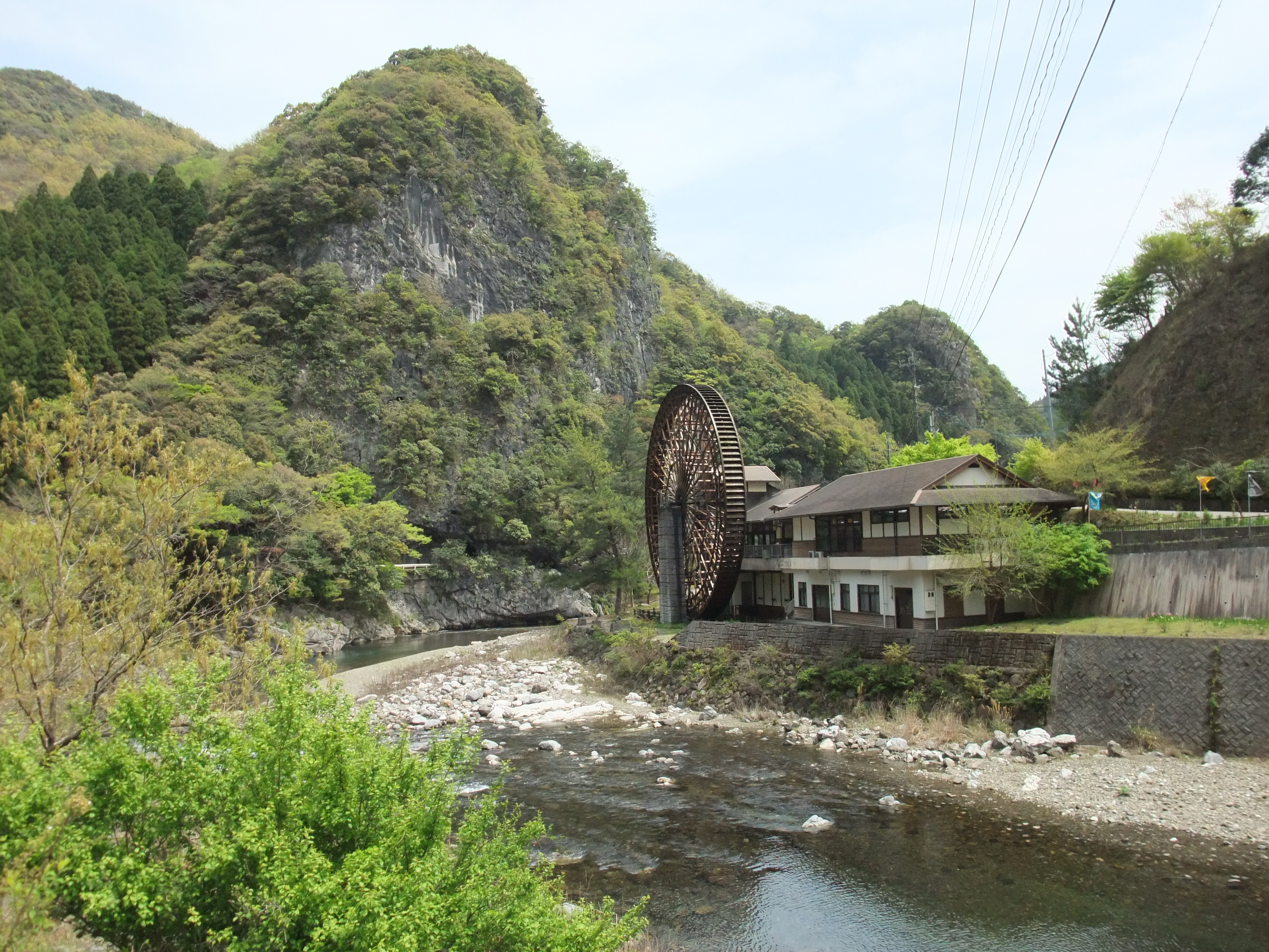 佐伯市本匠の日本一の大水車